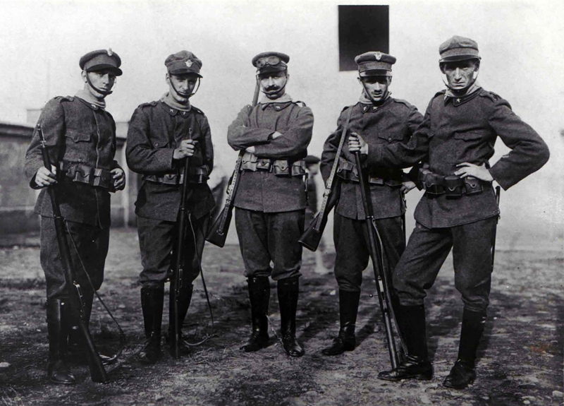 Da sinistra: Filippo Tommaso Marinetti, Antonio Sant'Elia, uno sconosciuto, Mario Sironi e Umberto Boccioni